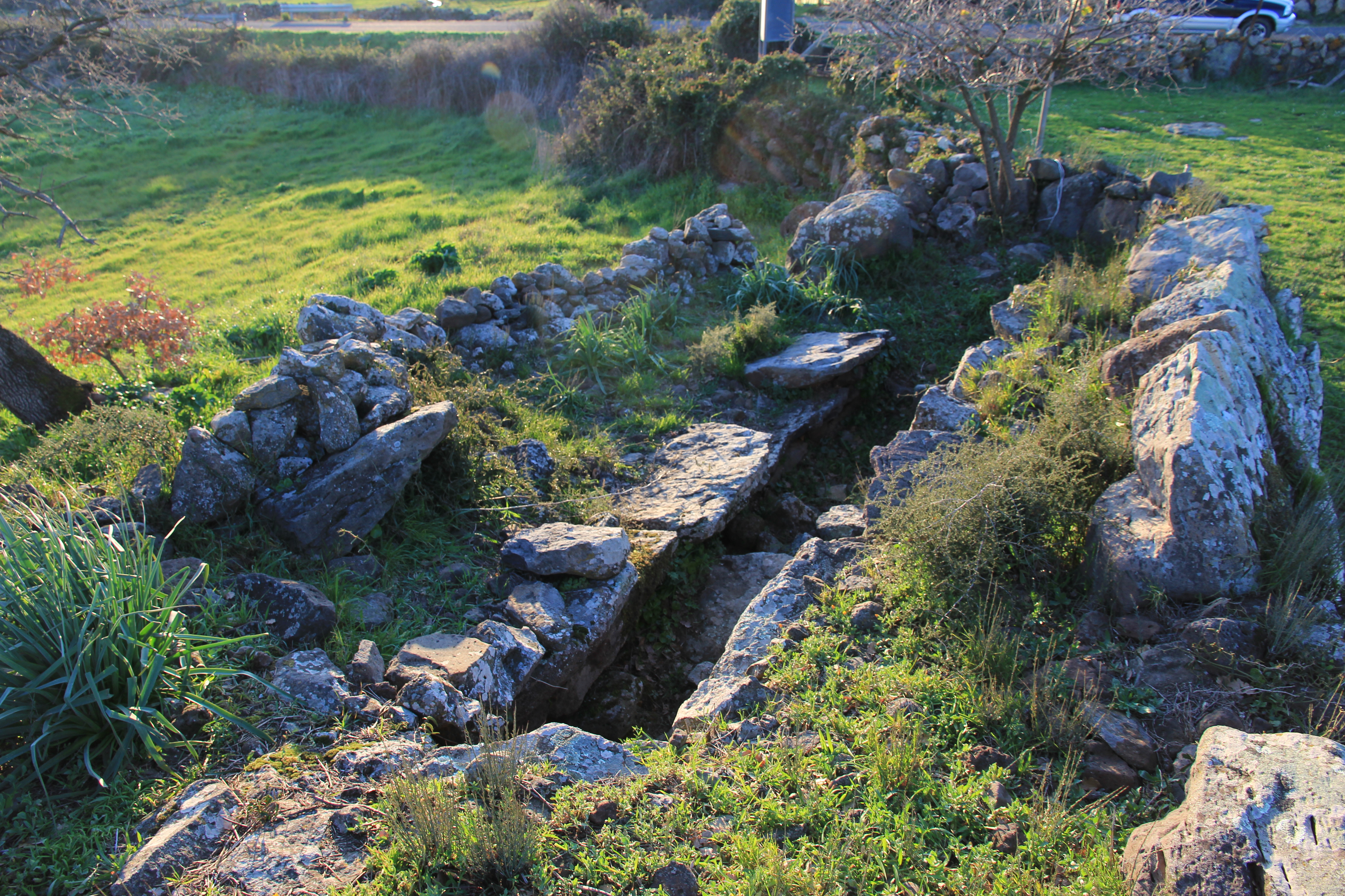 Birori - Tomba dei giganti di Lassia o Noazza III